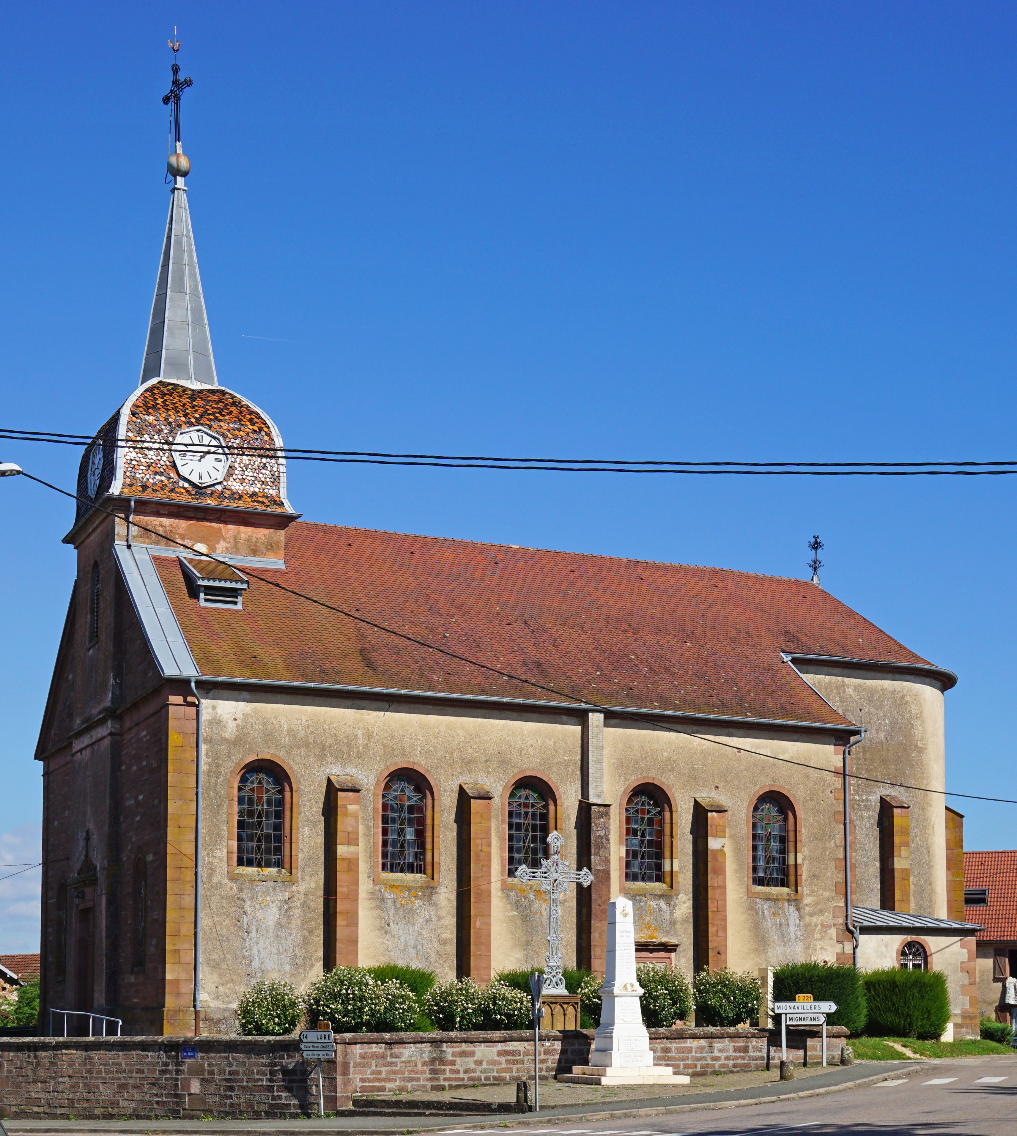 L'église de Senargent.